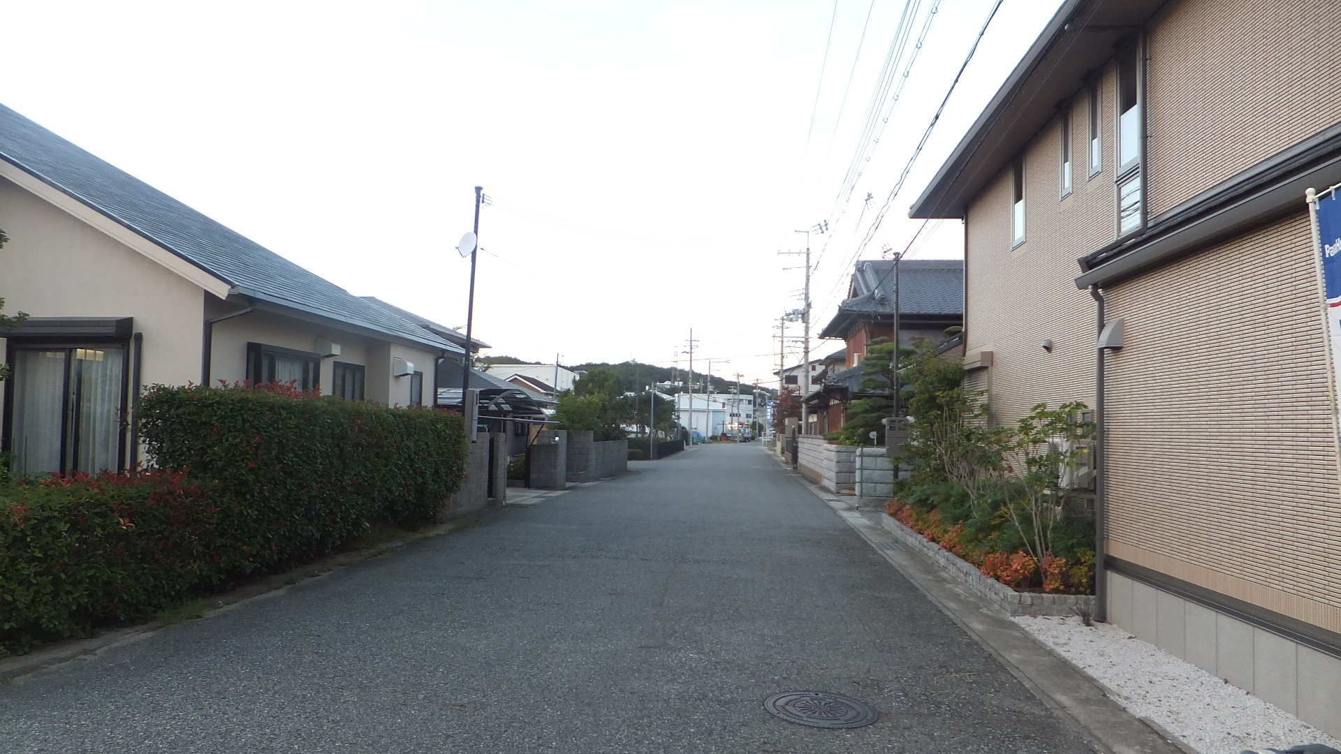 兵庫県三木市大村